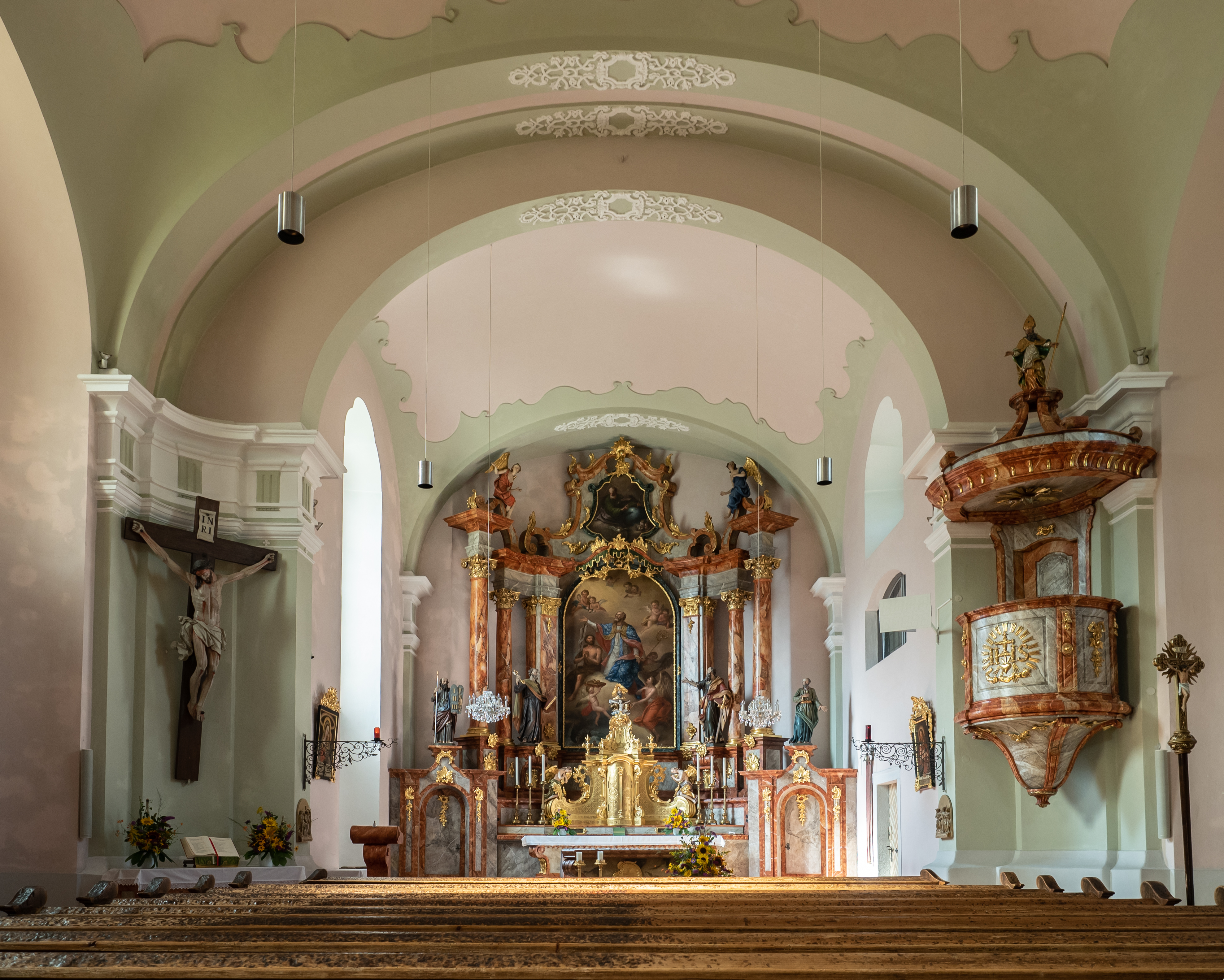 Blick zum Hochaltar der Pfarrkirche Hollenstein an der Ybbs